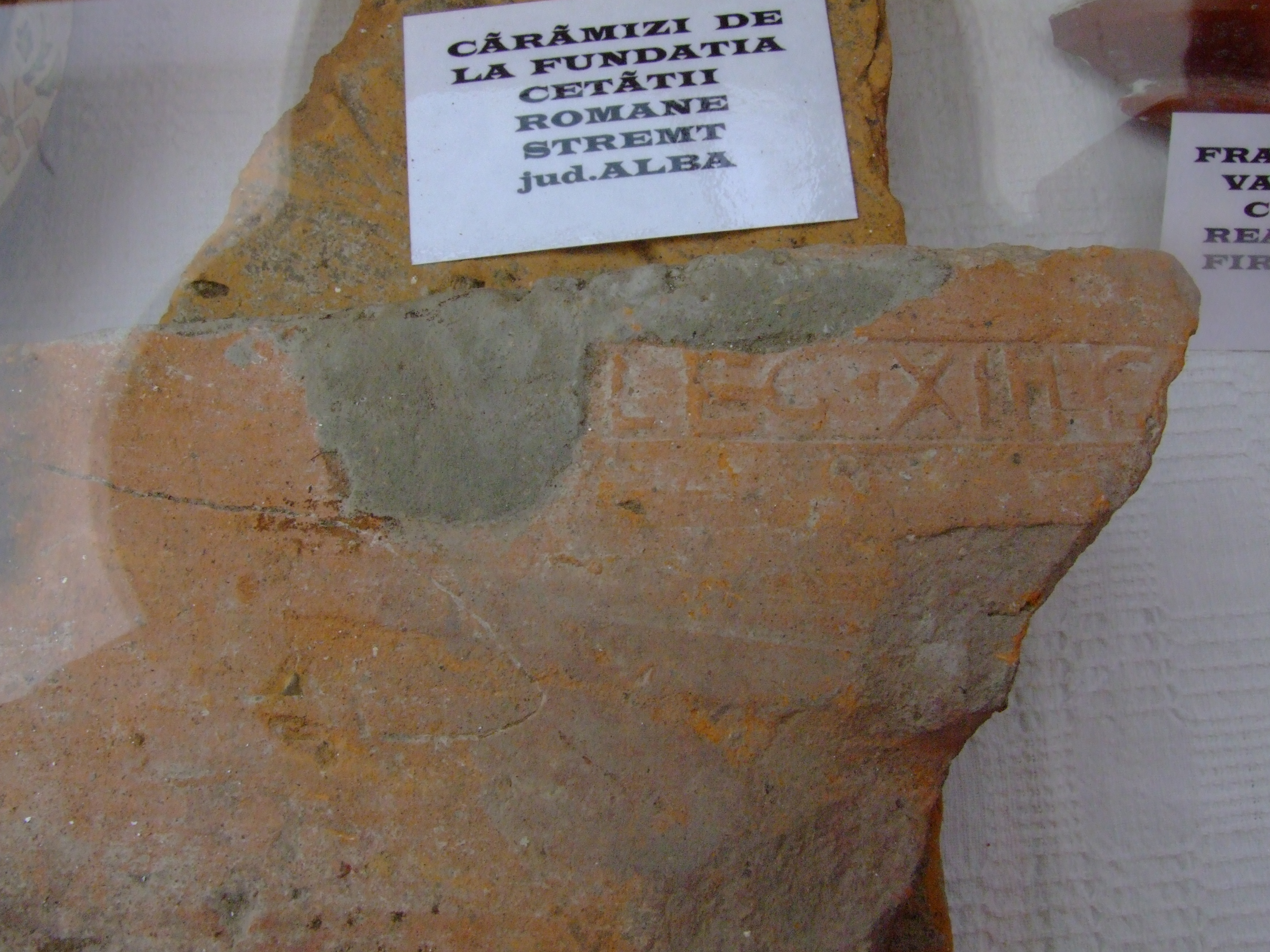 LegioXIII Brick